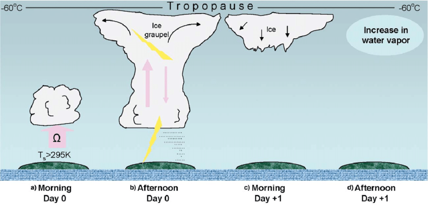 Äikesepilve staadiumid